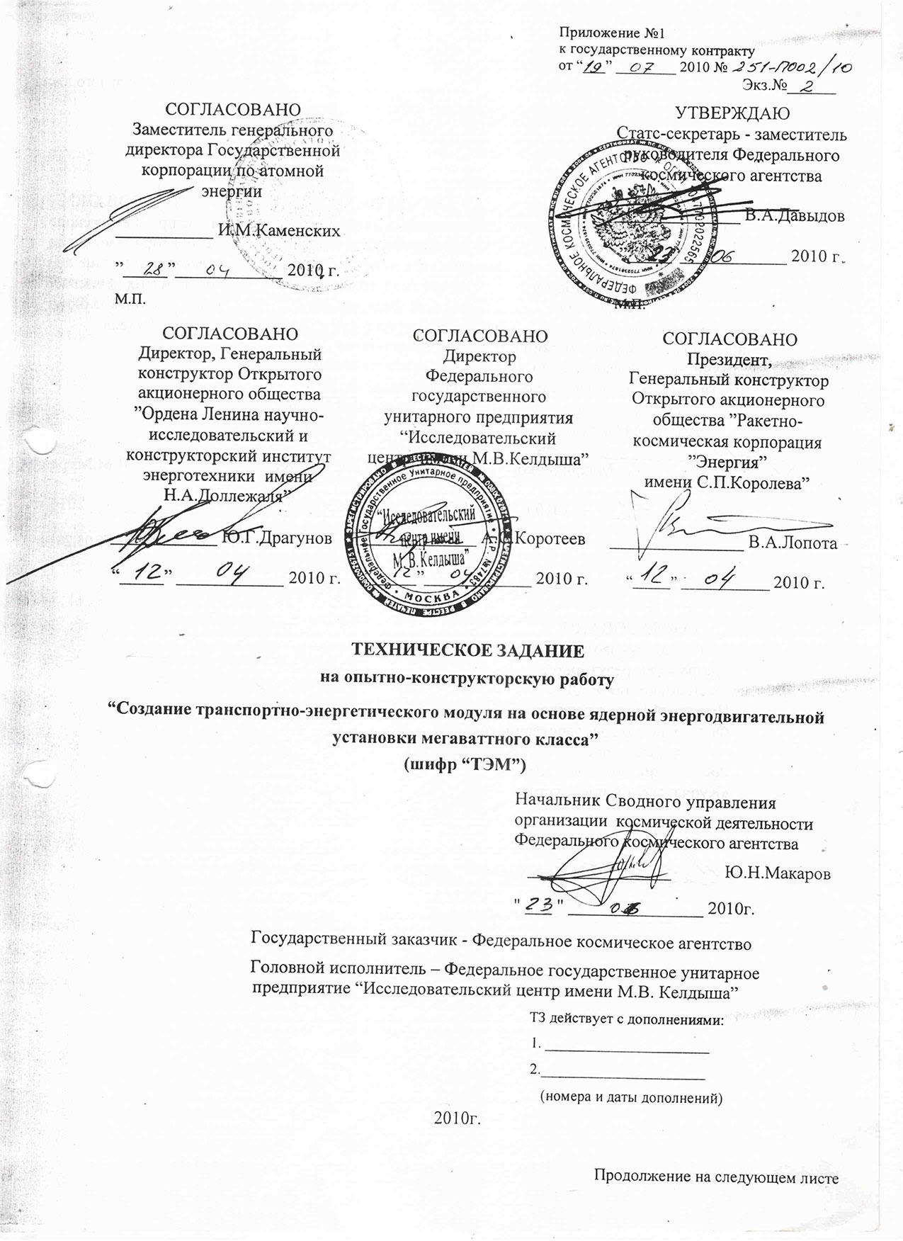 Титульный лист Технического задания